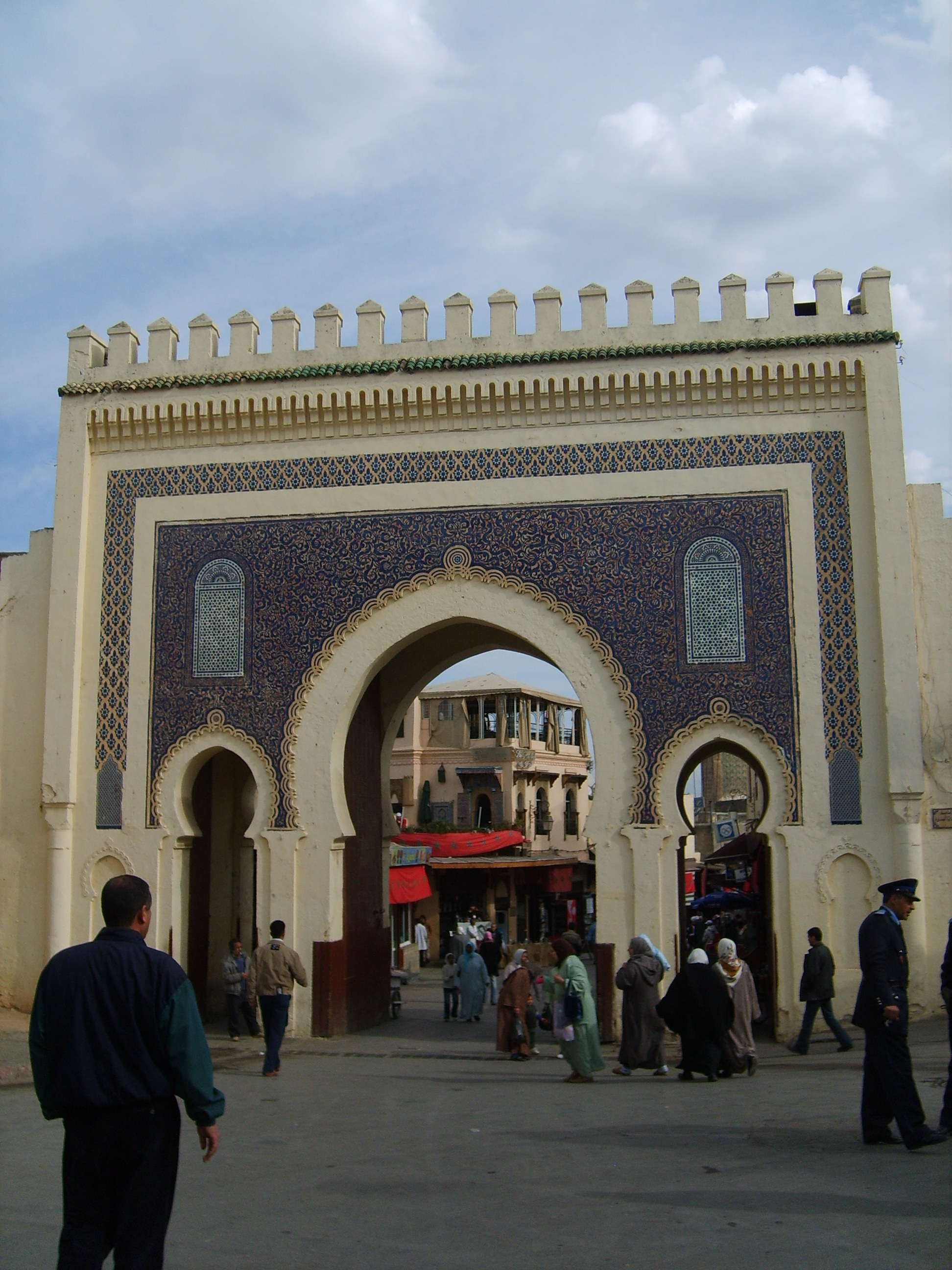 Bab Bou Jeloud